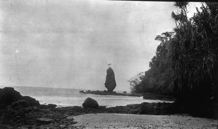 Foto. Kustlandschap nabij Pangandaran aan de zuidkust van West-Java